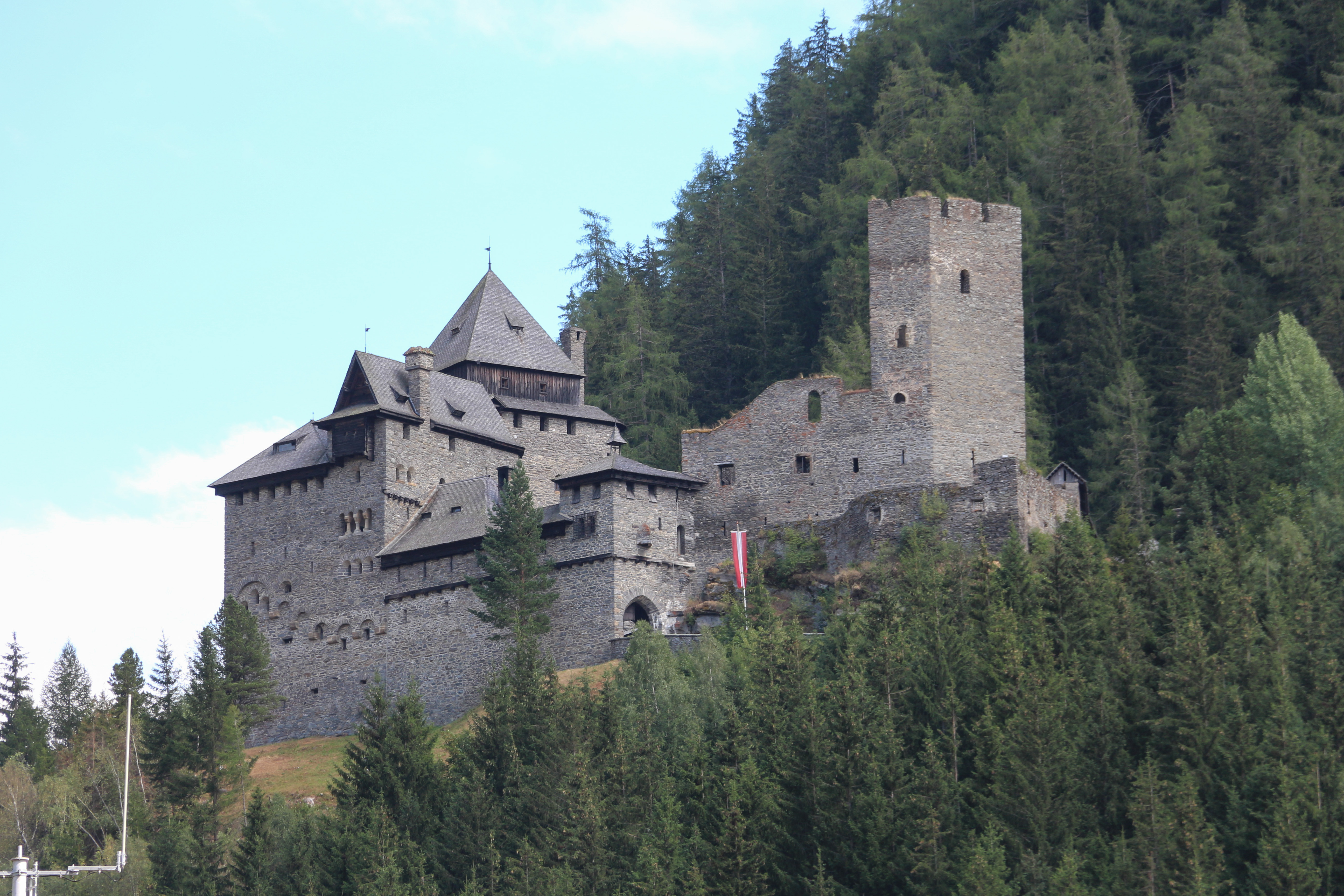 Burg Finstergrün, Ramingstein